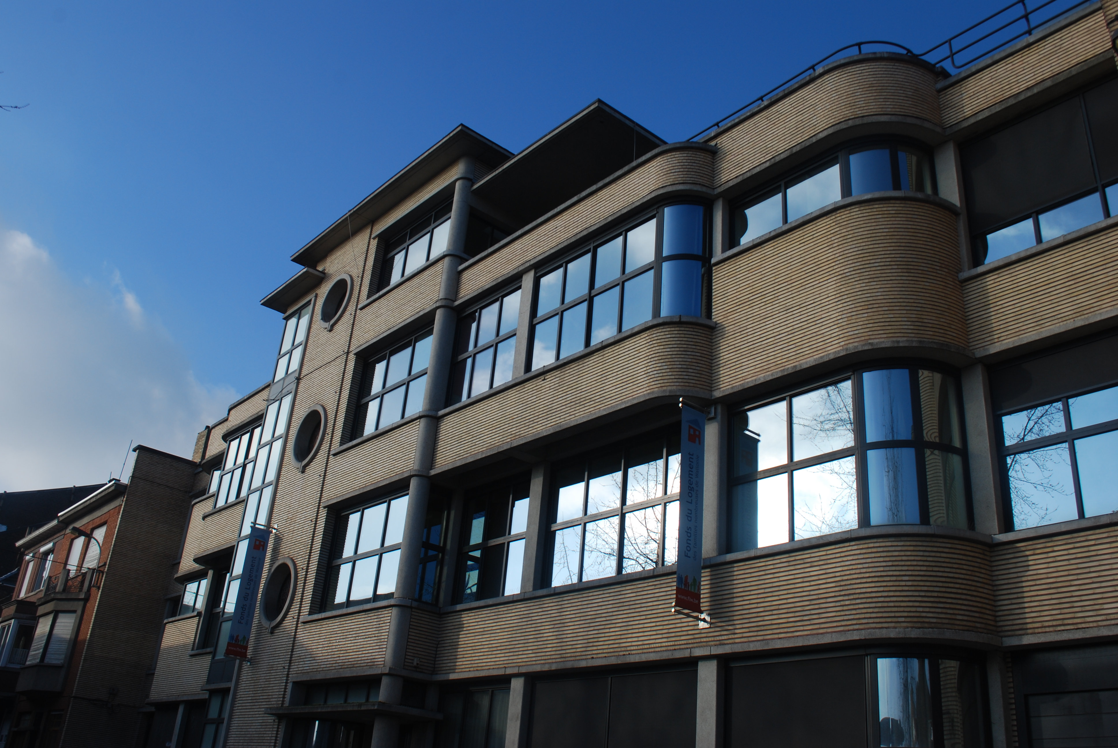 Vue du quartier de Jonfosse à Liège.